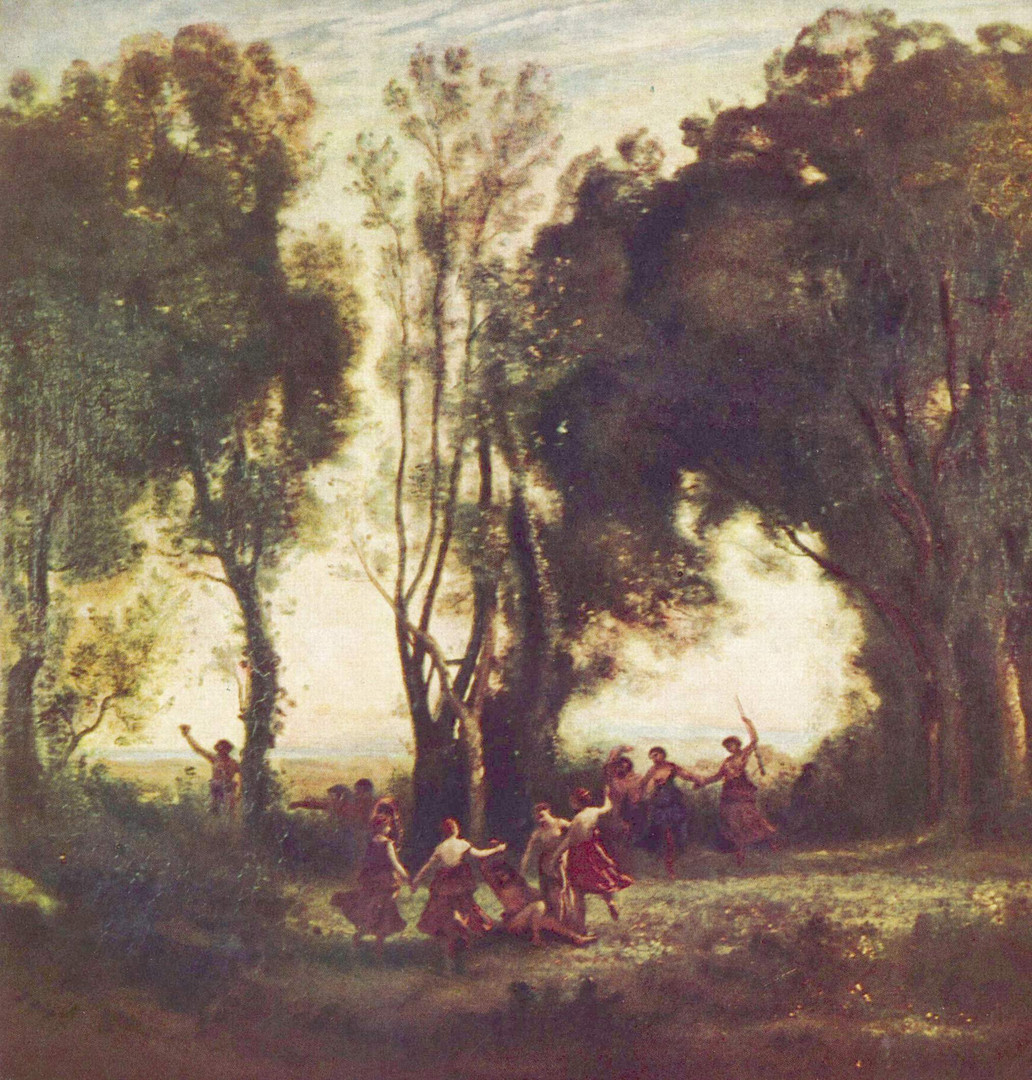 detail